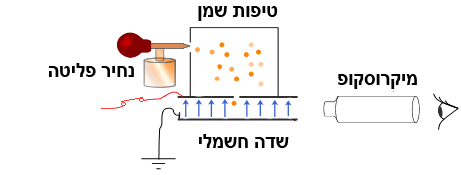 סכמה של הניסוי.